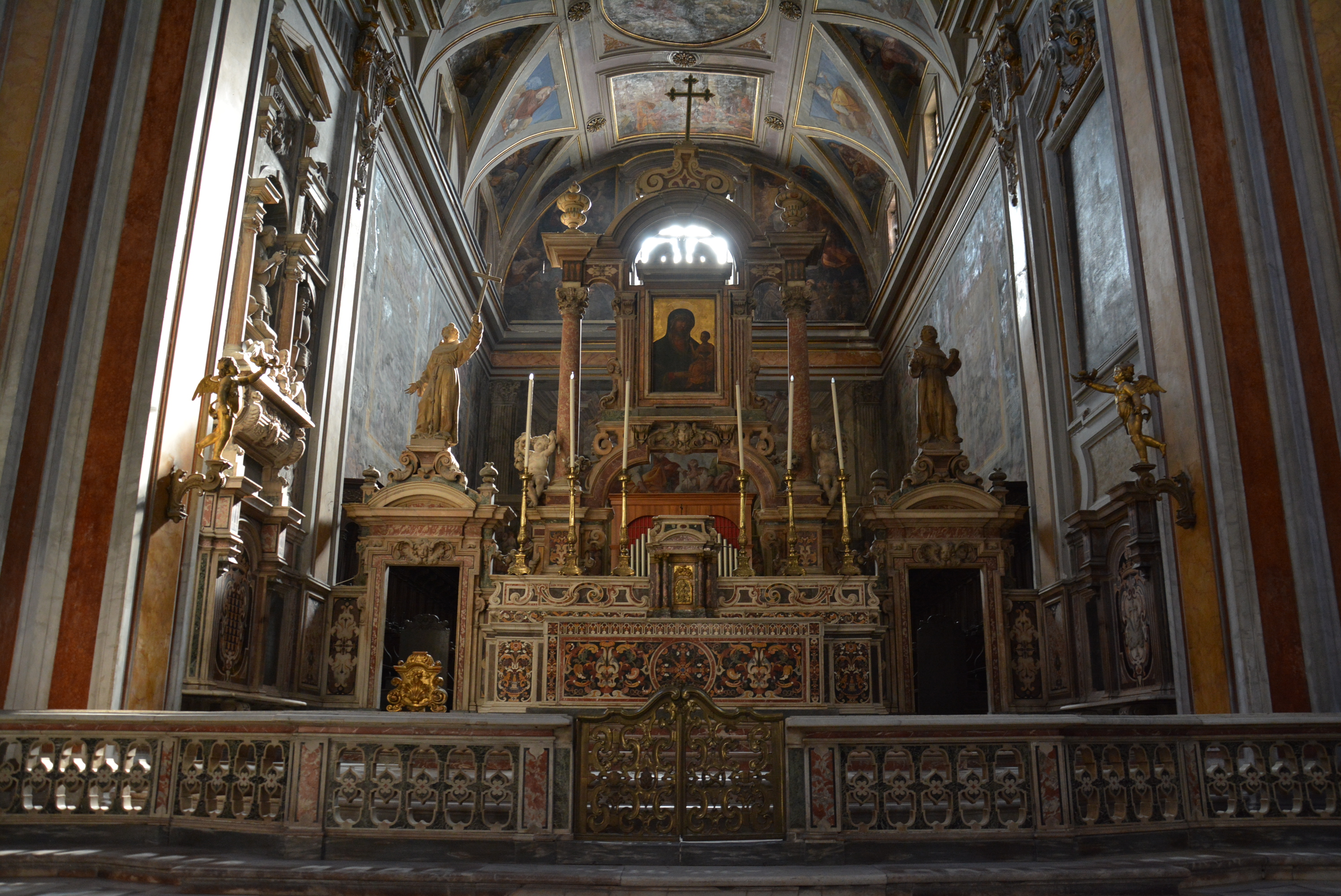 Chiesa di Santa Maria la Nova a Napoli